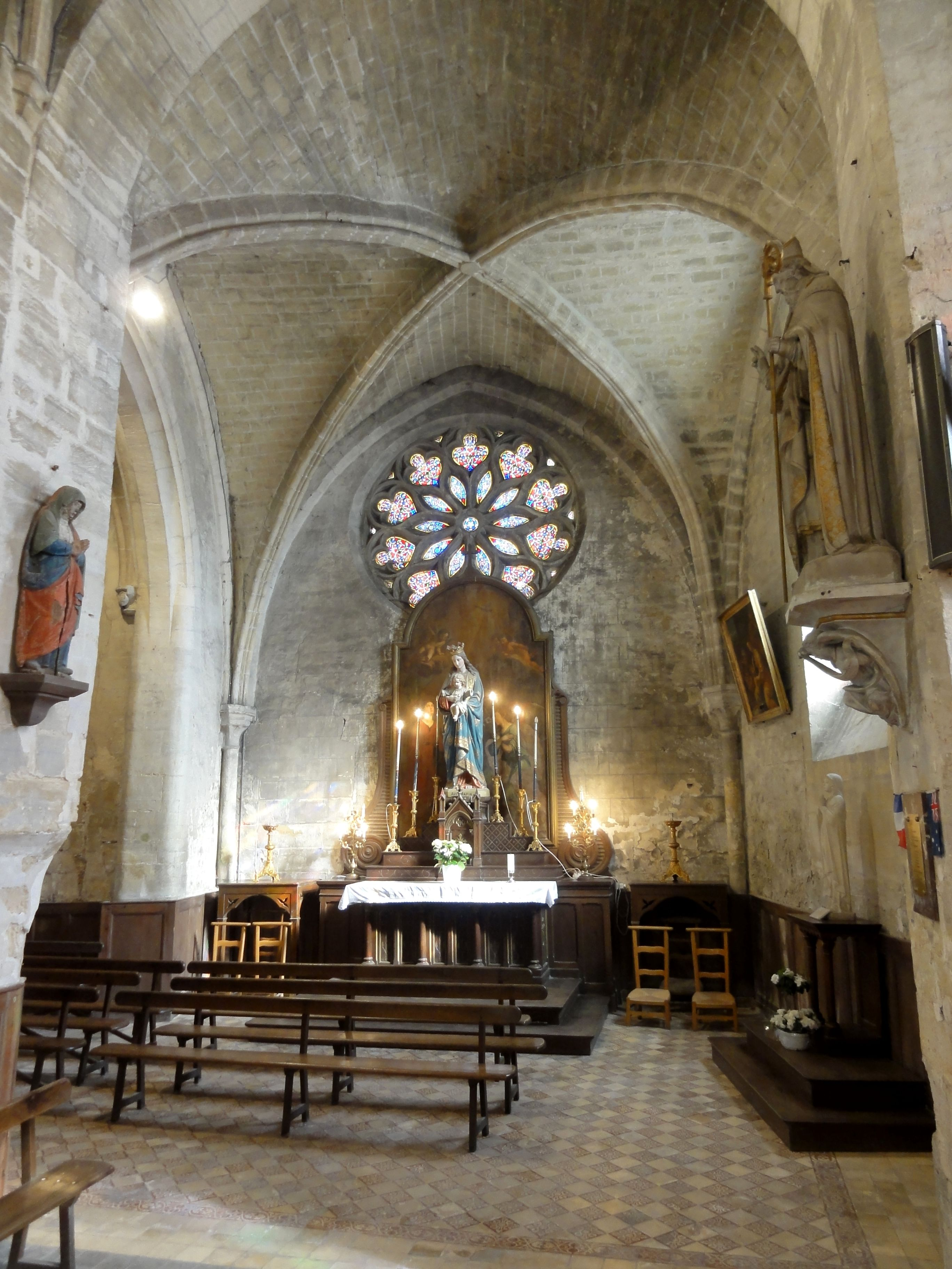 Croisée, vue vers le nord.